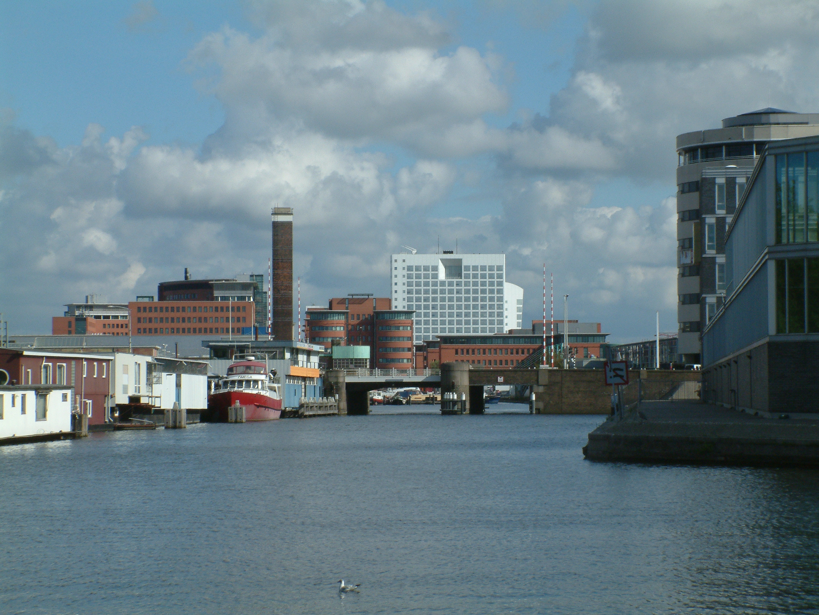 Brug in Den Haag